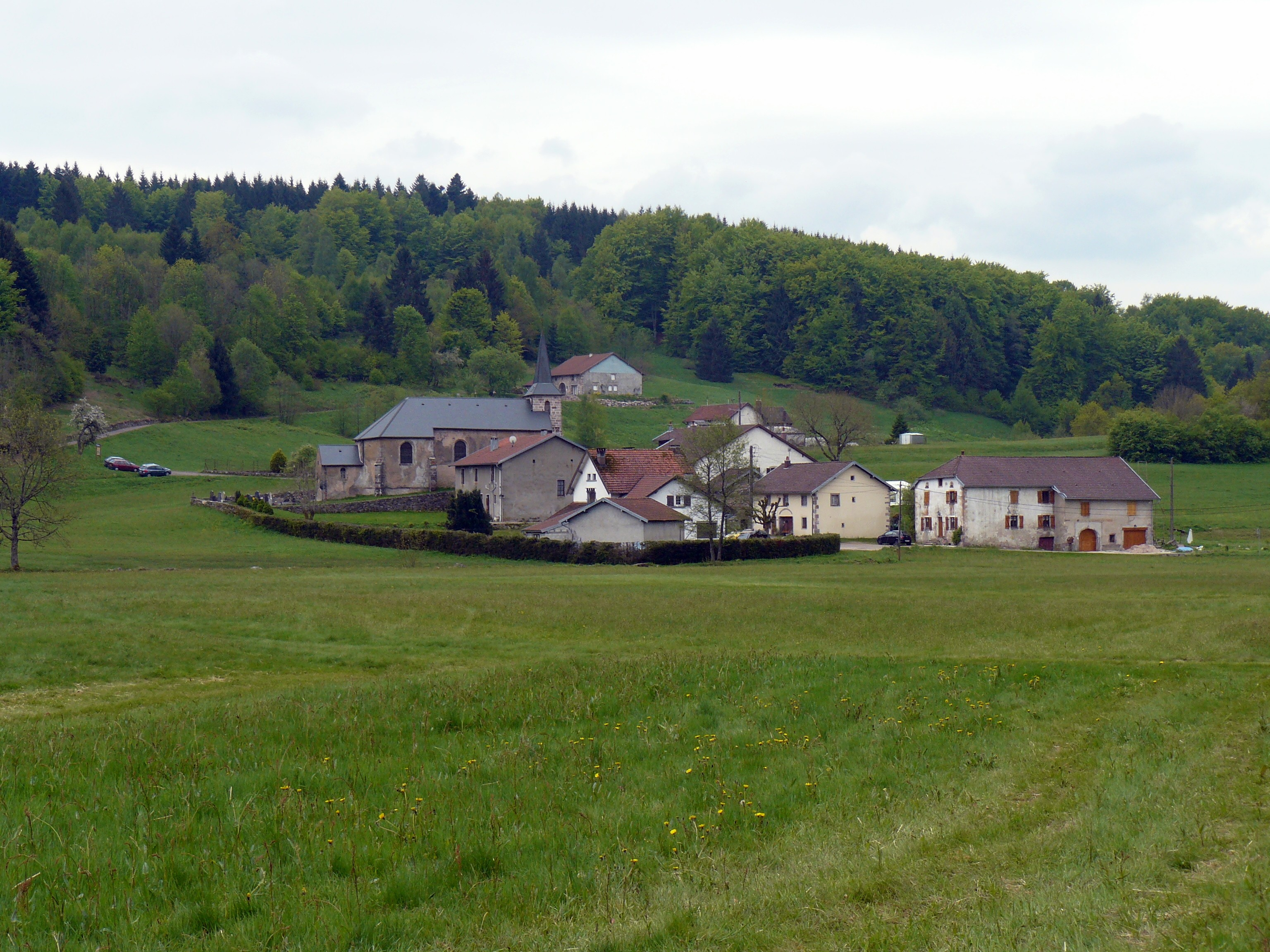 Beulotte-Saint-Laurent (Haute-Saône, France)